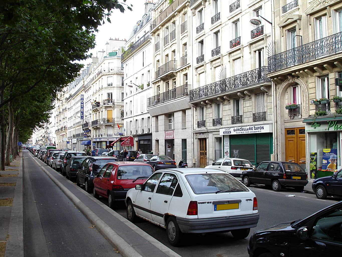 Le boulevard Richard-Lenoir à Paris (France)